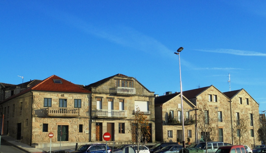 Casas marineras de A Moureira en Pontevedra capital